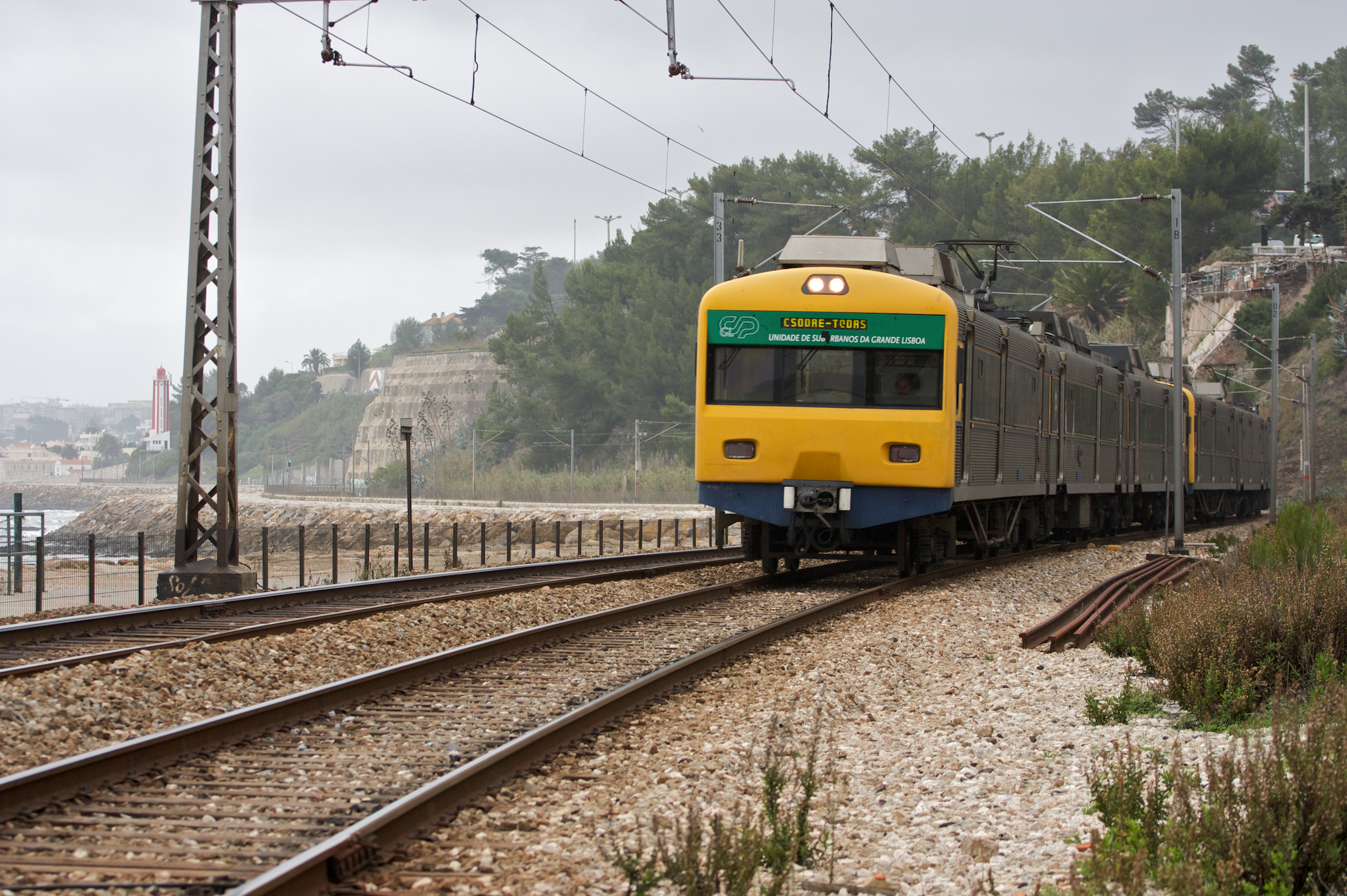 Tipo: Comboio Urbano 19720 [Oeiras - Cais do Sodré] Local: Cruz Quebrada [Linha de Cascais, PK 10] Data e hora: 13 de Novembro de 2009 [16h58] Material: Automotoras 326x e 325x [Unidade Tripla Eléctrica + Unidade Quádrupla Eléctrica]